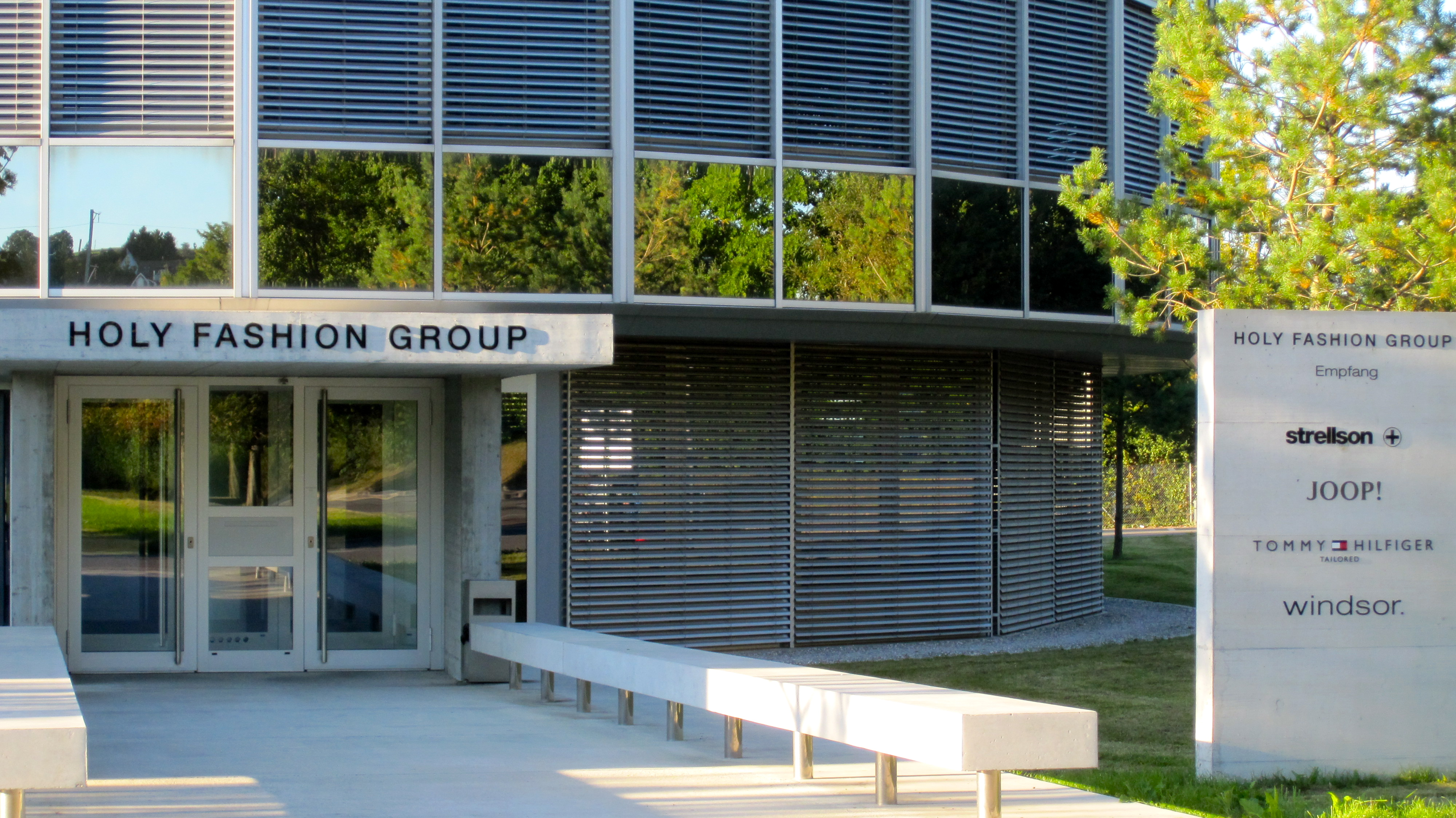 Gebäude der Holy Fashion Group in Kreuzlingen